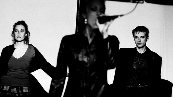 Jezsó Krisztina (Chris), Pásztor Anna (Julie) és Galambos Attila (Jean) a MonoPorNo című előadásban. Budapest, RS9 Színház.